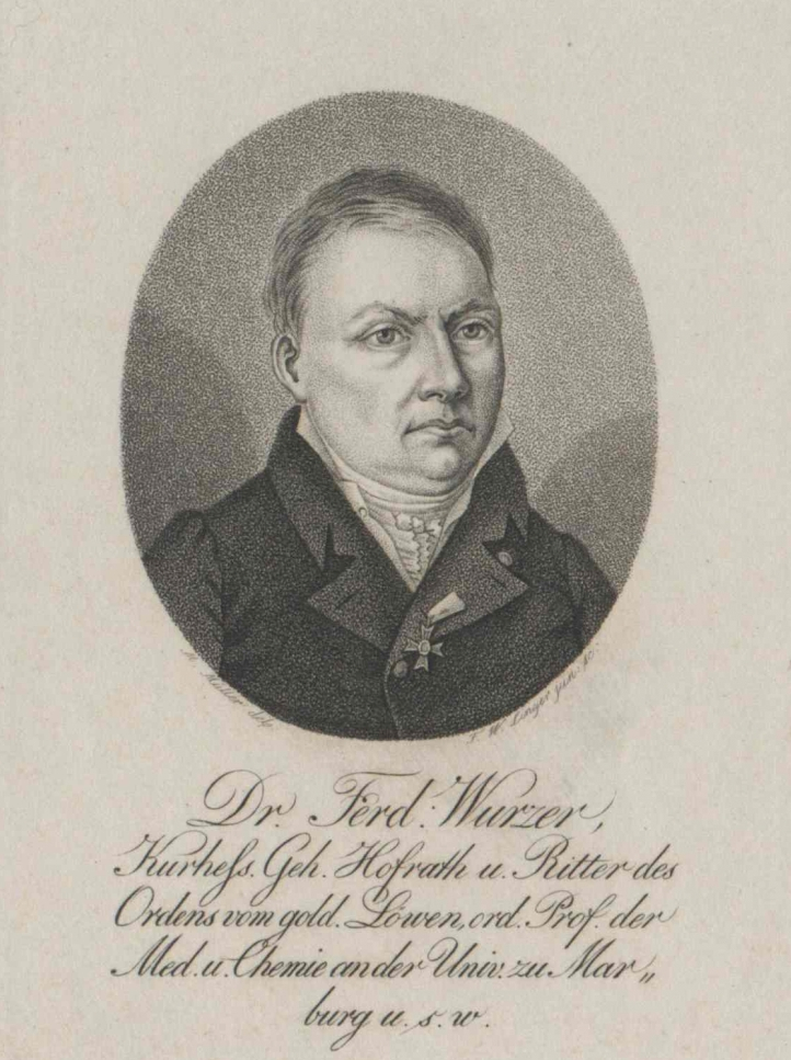 Portrait von Ferdinand Wurzer, Bildunterschrift: Dr. Ferd: Wurzer, Kurhess. Geh. Hofrath u. Ritter des Ordens vom gold. Löwen, ord. Prof. der Med. u. Chemie an der Univ. zu Mar- burg u.s.w.